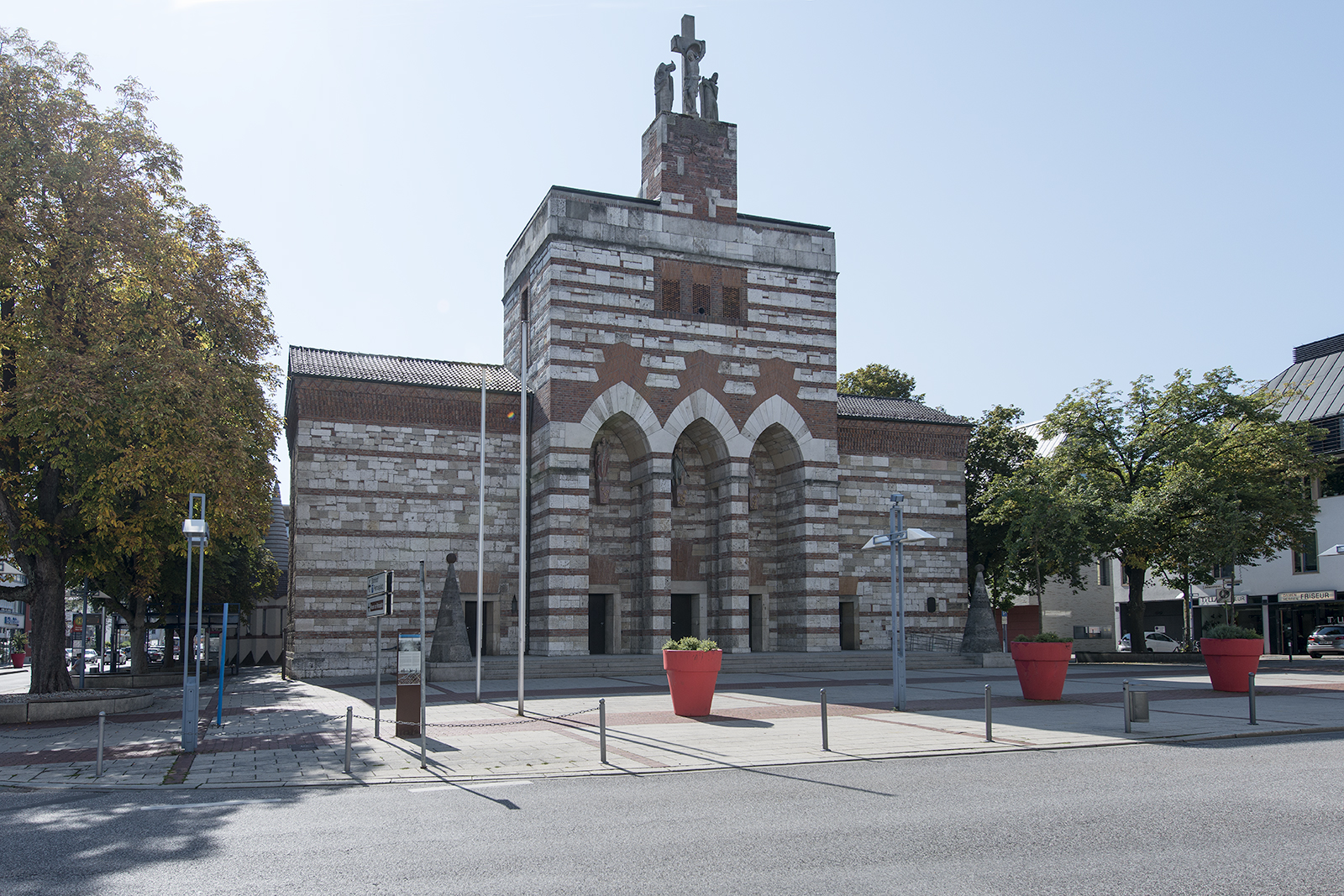 St. Johann-Baptist, Neu-Ulm, Außenansicht